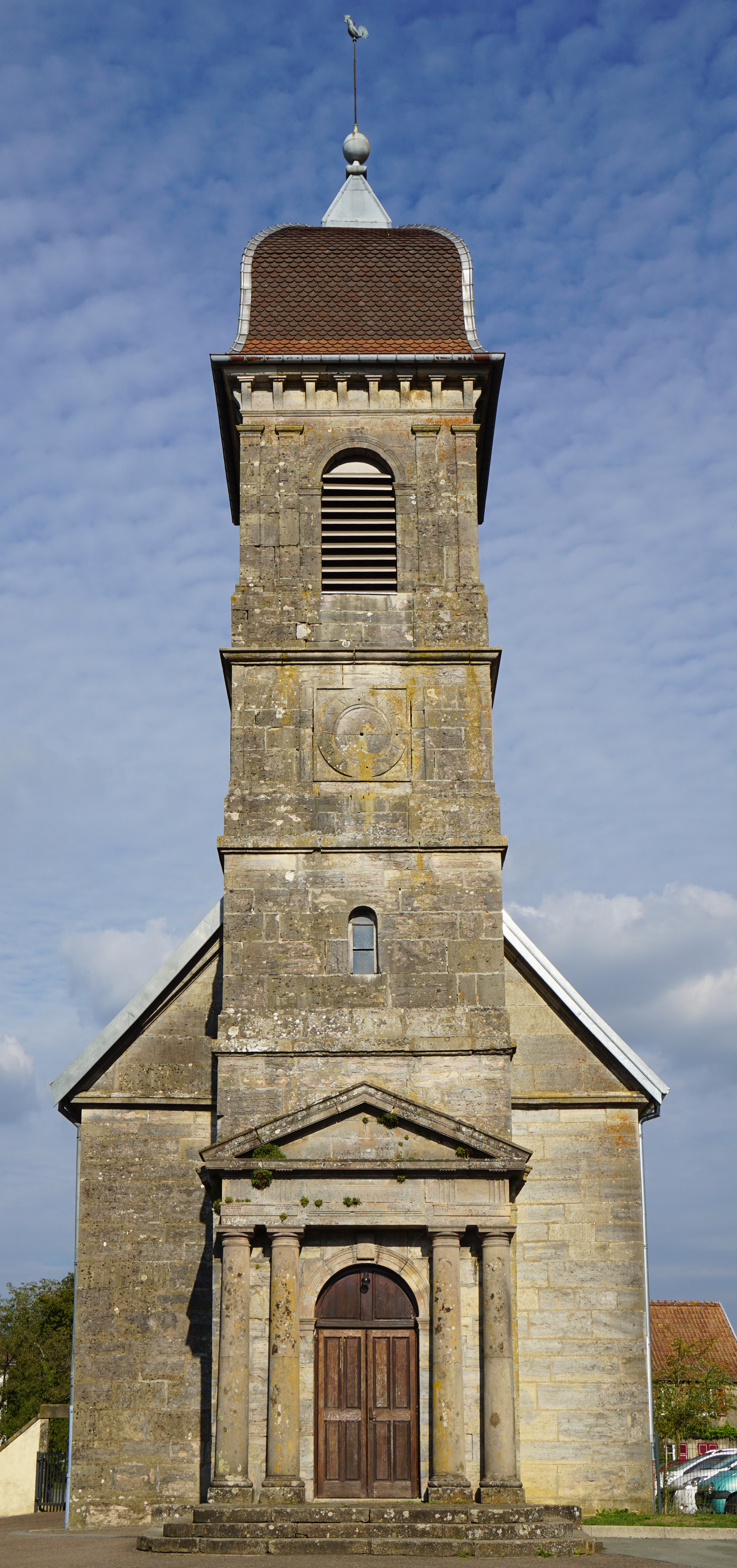 Le temple protestant d'Échenans-sous-Mont-Vaudois.